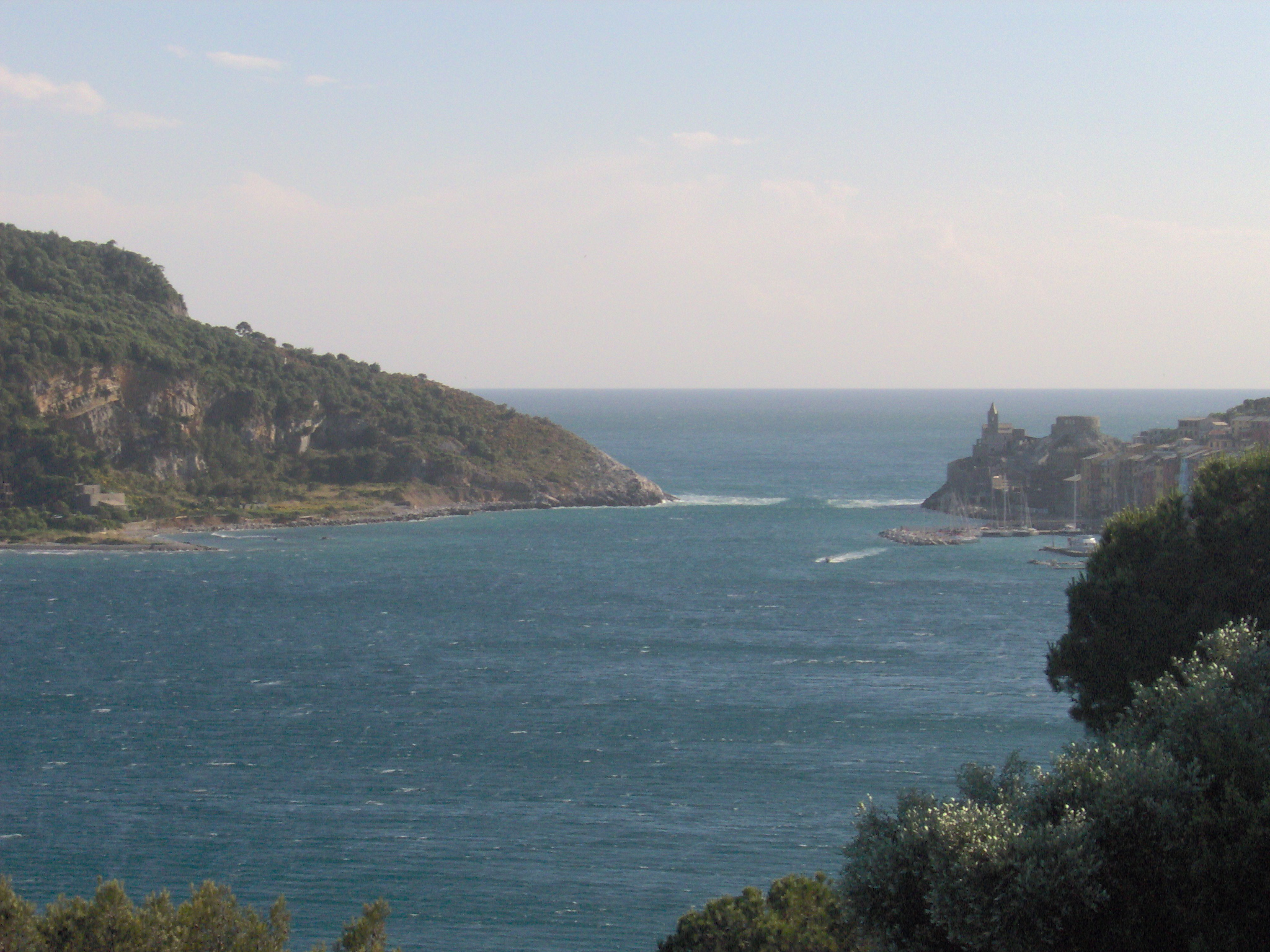 Foto delle bocche di Portovenere. William Domenichini. 30 maggio 2005. ore 18.30 circa